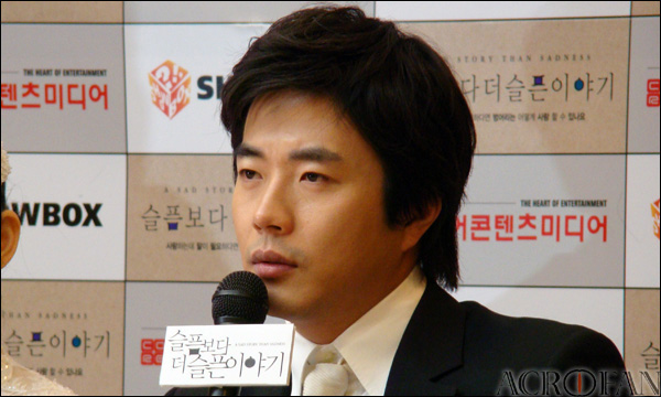 슬픔보다 더 슬픈 이야기 현장공개